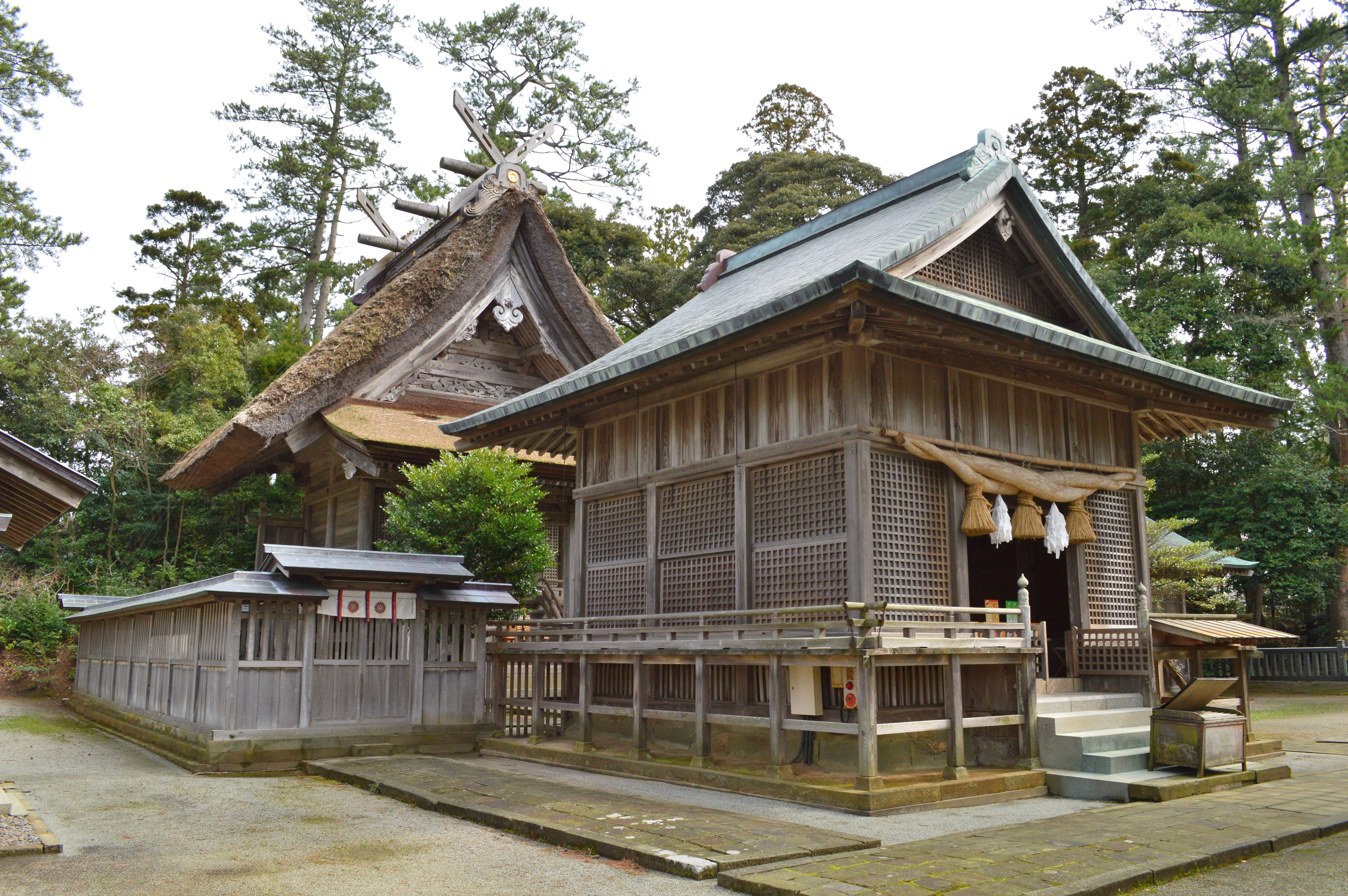 水若酢神社 社殿